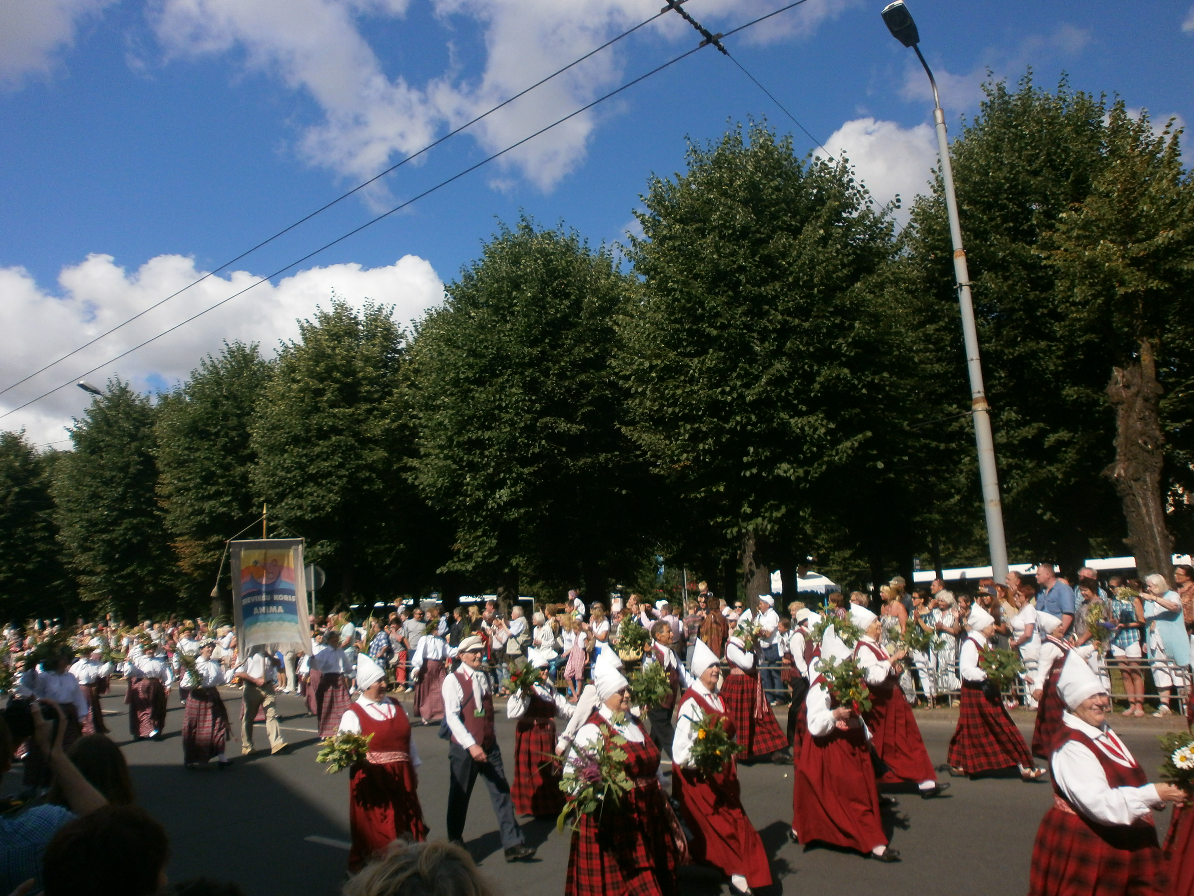 Dziesmu un deju svētku gājiens 2013. gadā